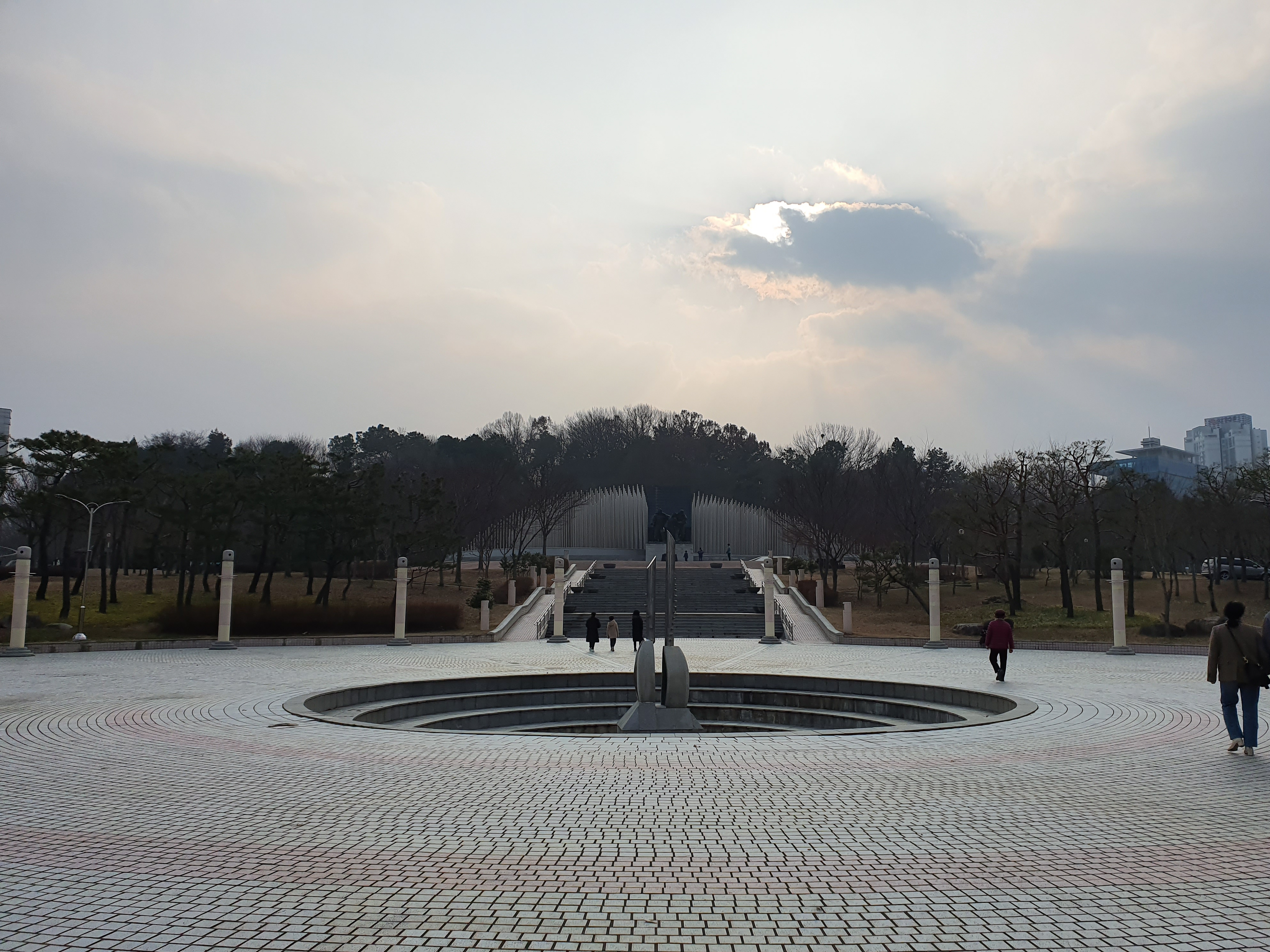 광주광역시의 5.18 기념공원